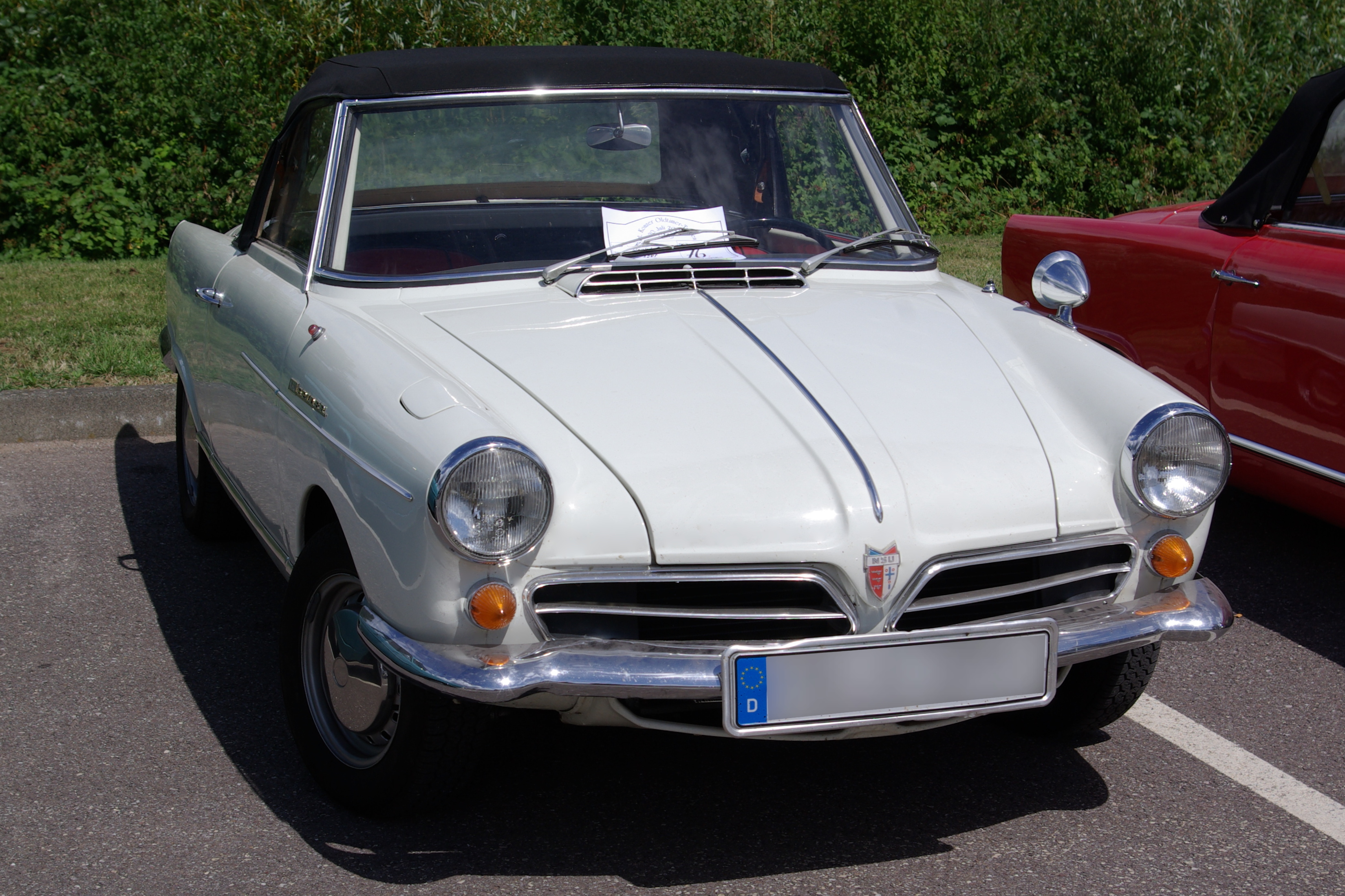 NSU Wankel Spider, Baujahr 1967, 50 PS , aufgenommen bei / photographed at "Internationales Konzer Oldtimer-Treffen" am 20. Juli 2008